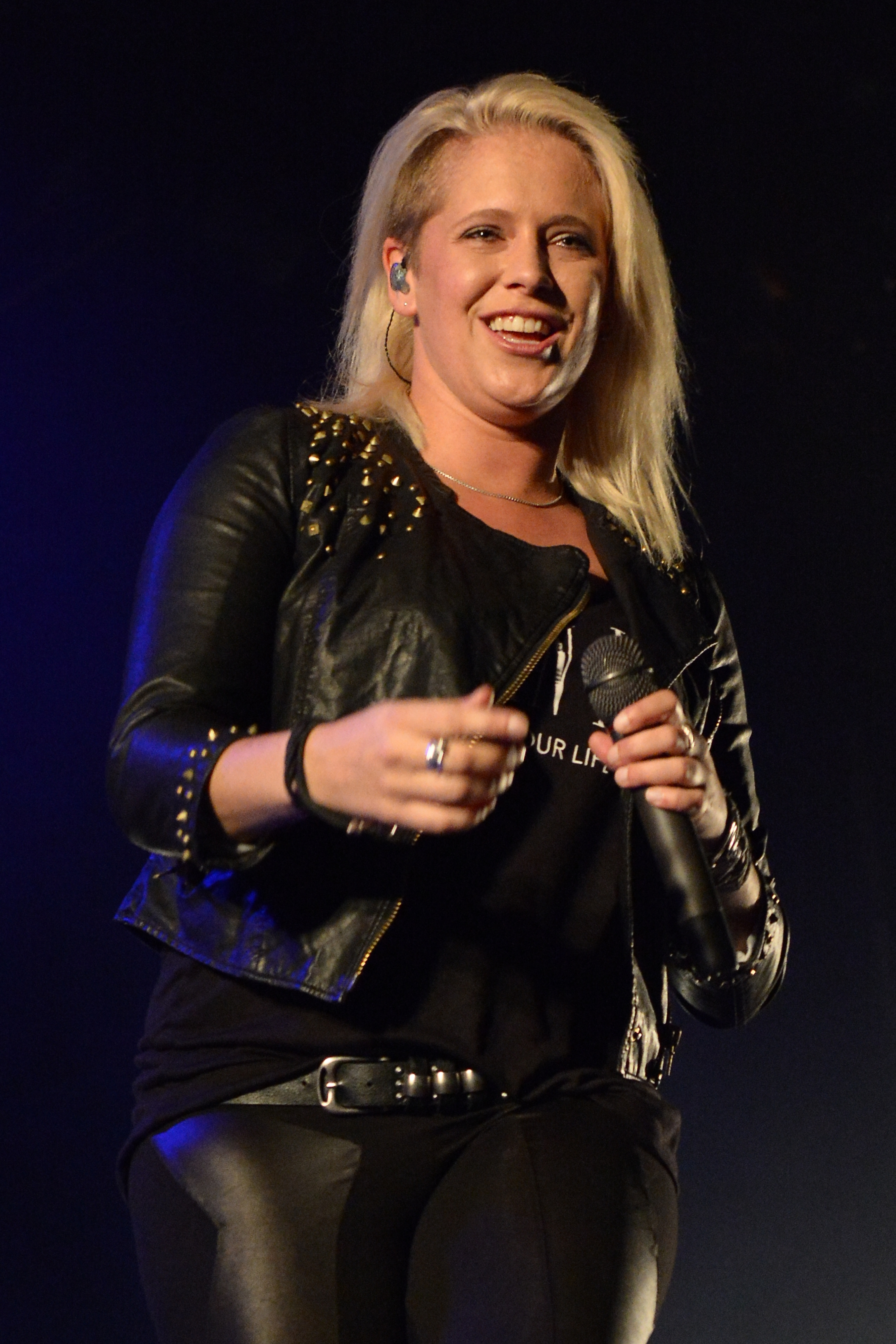 Luxuslärm bei Essen.Original. 2015